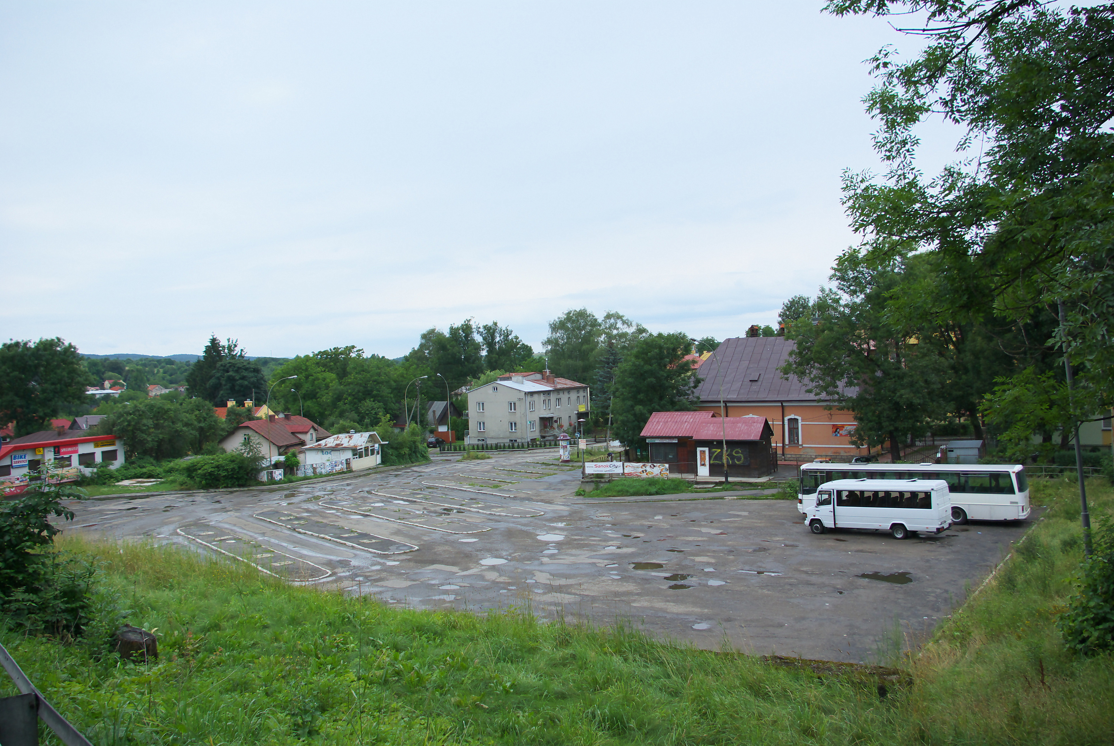 Była zajezdnia autobusowa "Okęcie" pod adresem ul. Jagiellońska 30 w Sanoku